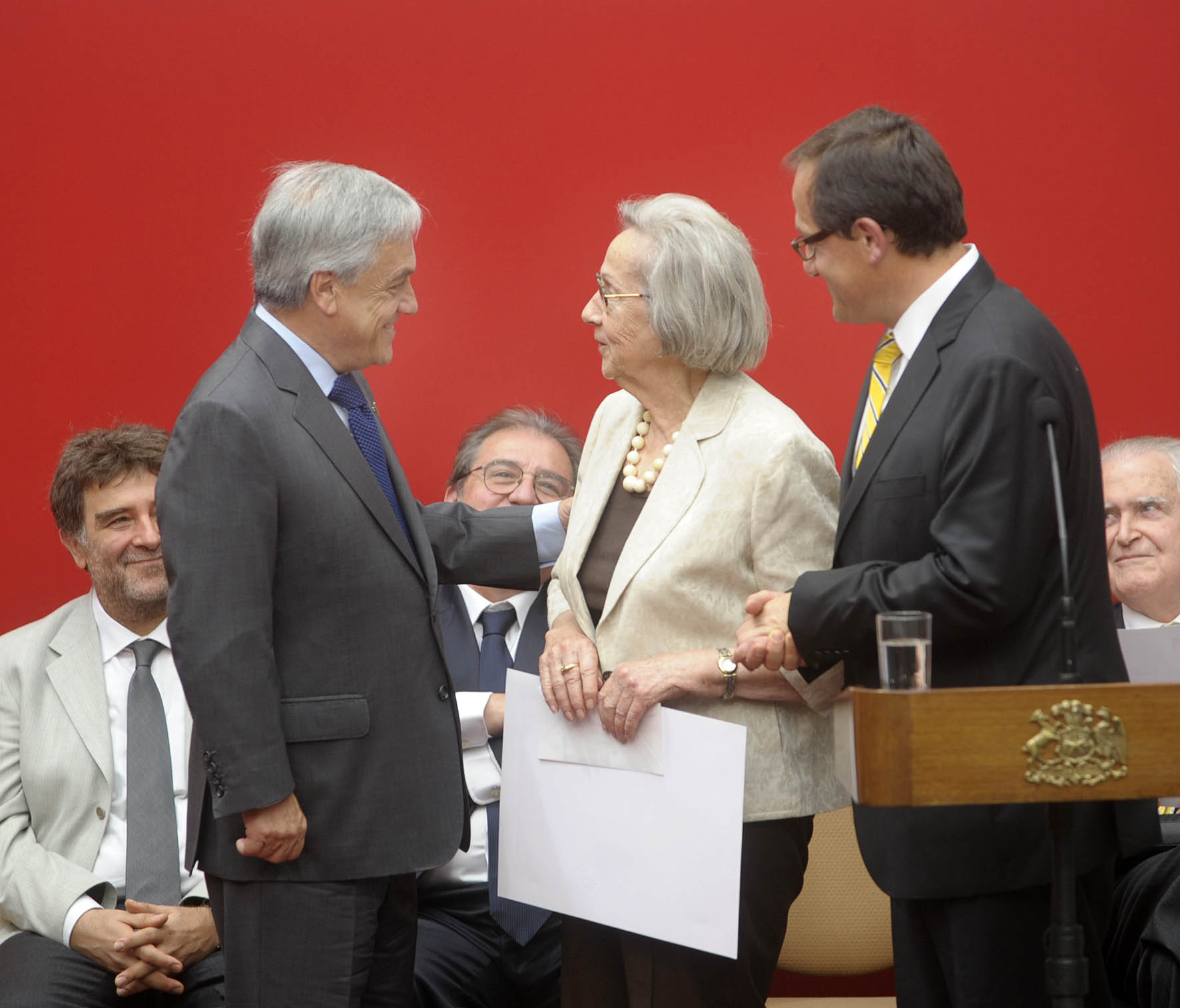 11-01-2012 Entrega premios nacionales